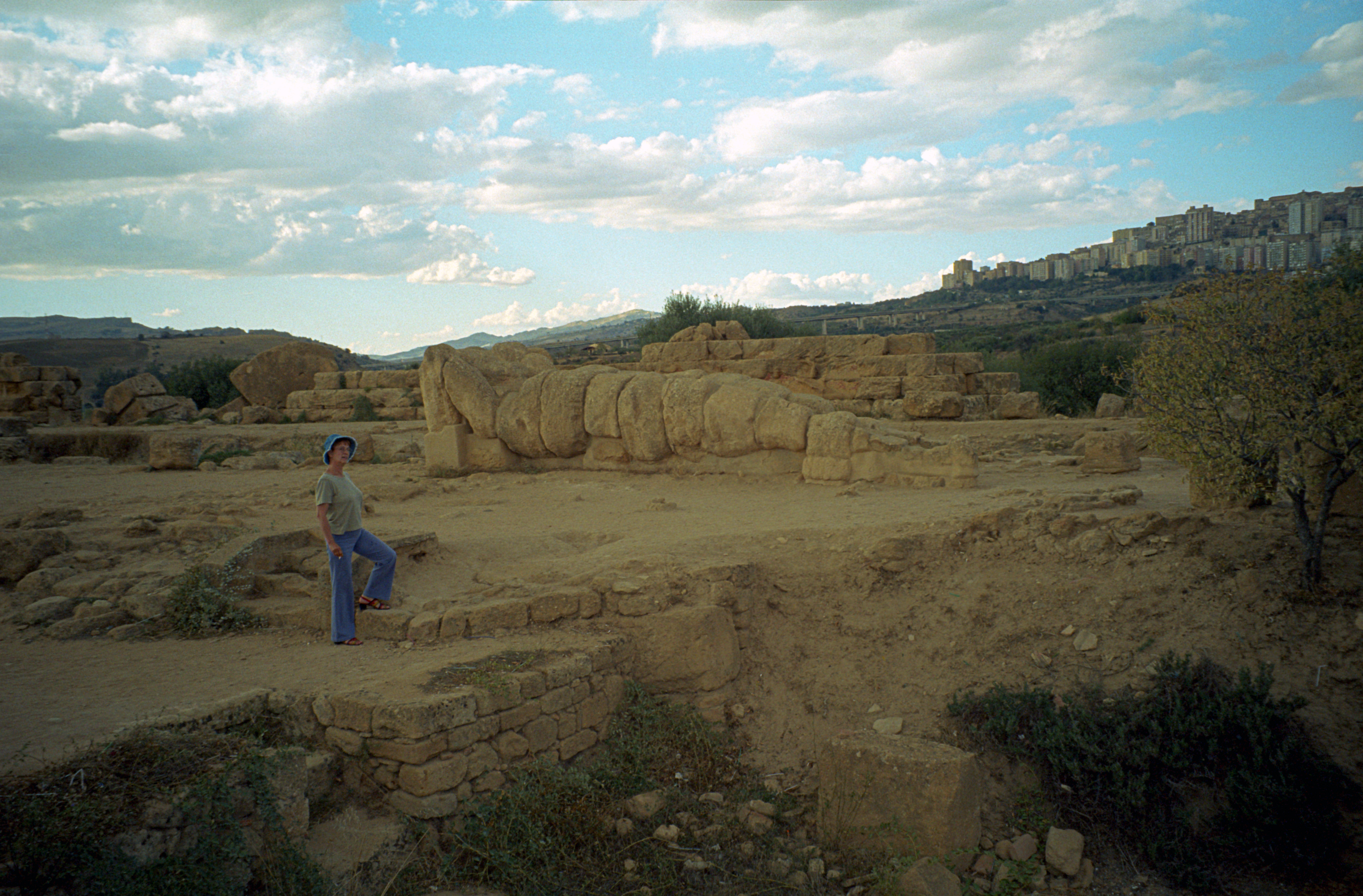 Sicily, telemon ze Świątyni Zeusa Olimpijskiego